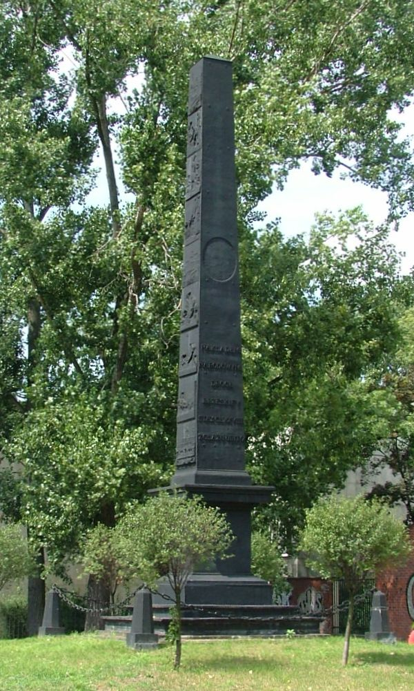 PL, Warsaw, Poland, Pomnik Budowy Szosy Brzeskiej, ul. Grochowska